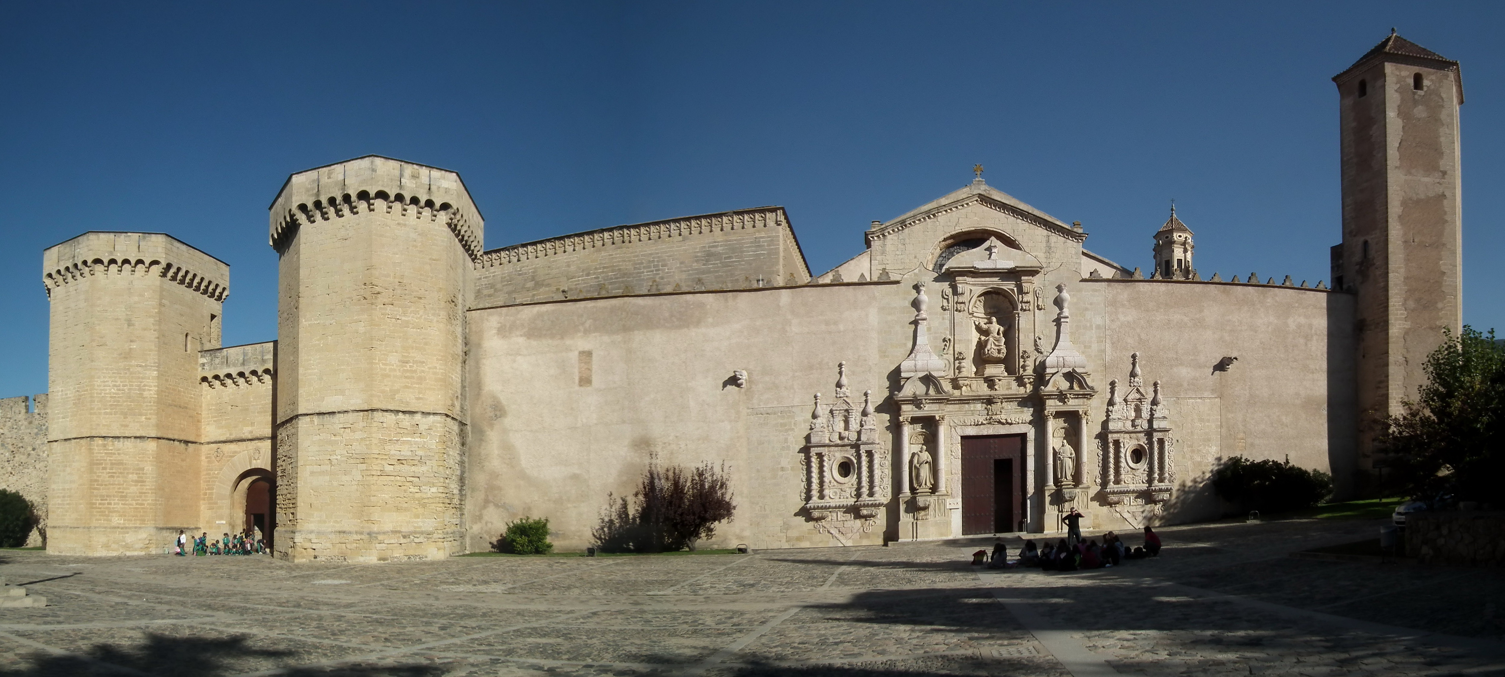 Reial Monestir de Poblet, Spain